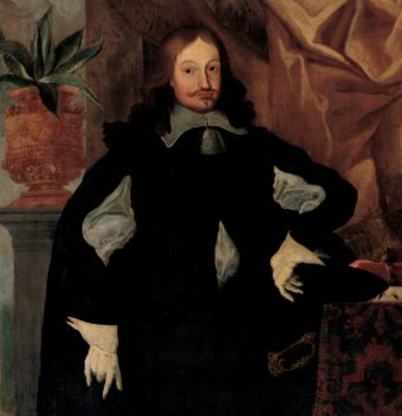 Karl Eusebius (* 1611; † 1684), prince of Liechtenstein